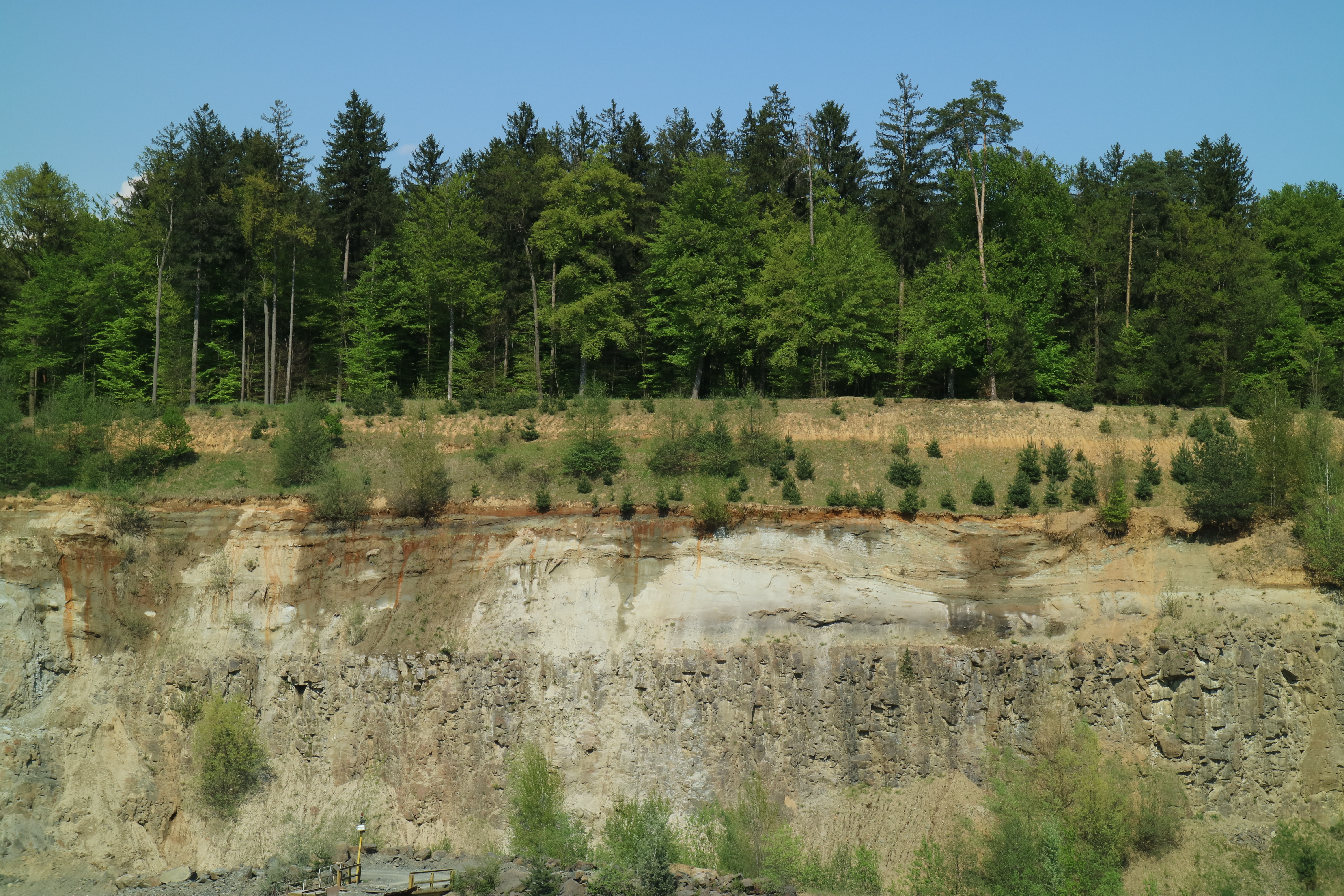 Basaltsteinbruch Weitendorf am Rand des Kaiserwaldes, Gemeinde Wildon (Steiermark)